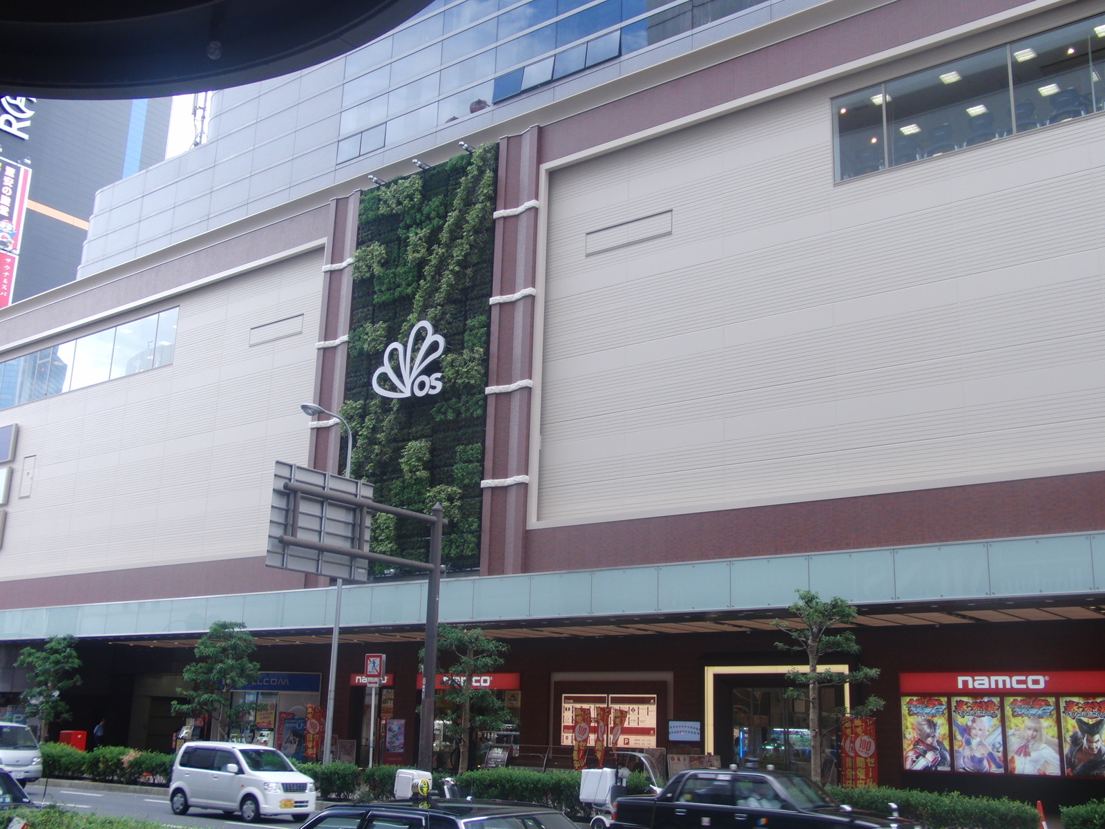 ナムコランド梅田店を撮影。